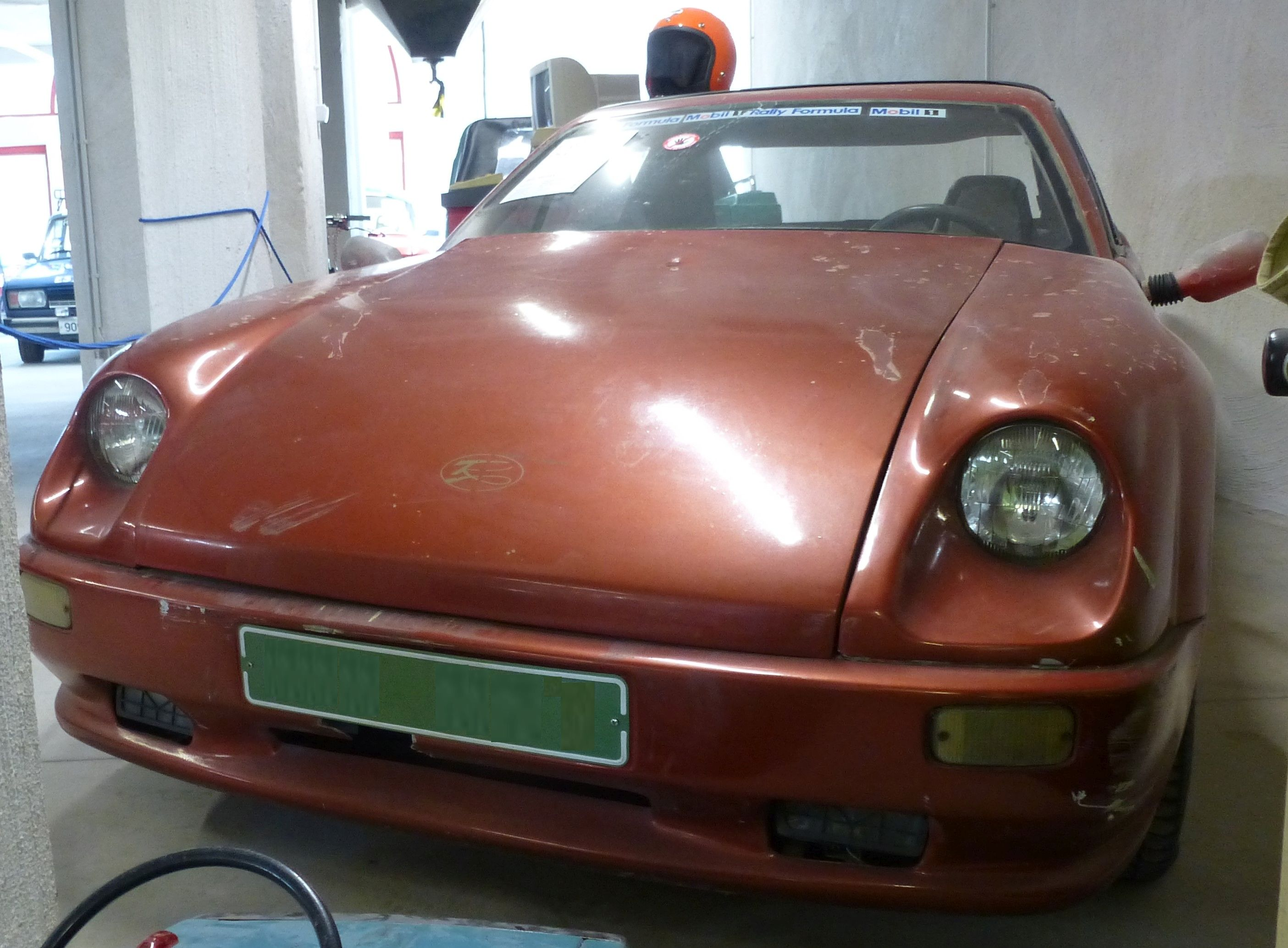 Rex Vilgas 1994